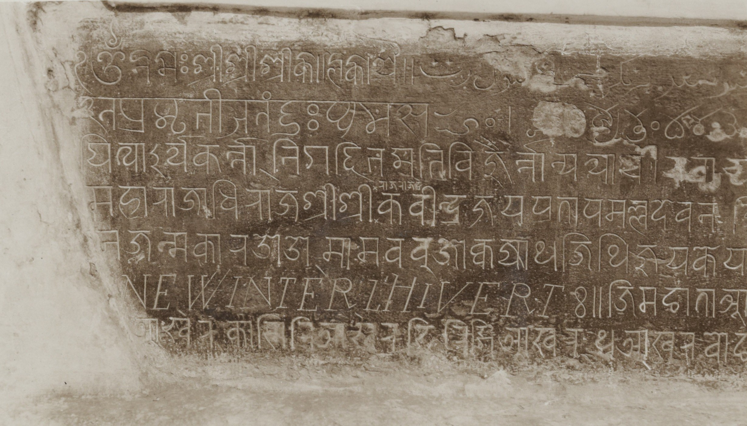 Steen met inscriptie op het Darbar Square, Kathmandu.